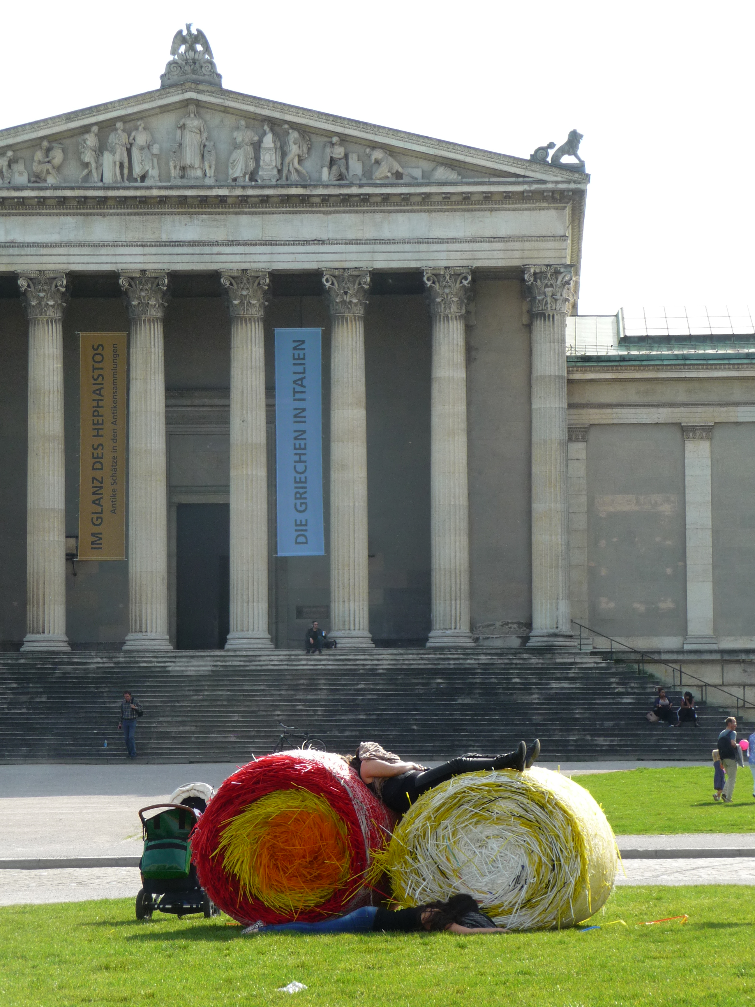 Der Königsplatz diente im Sommer einer Kunstaktion mit angenehmen Nebeneffekten.